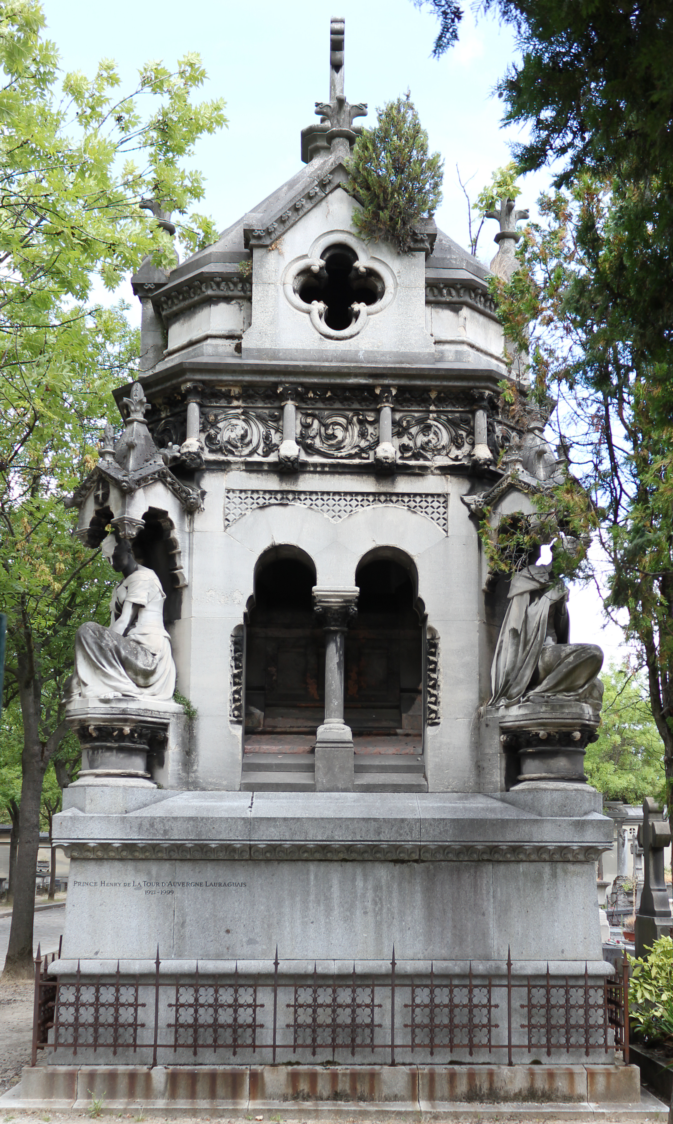 Sépulture de Tomás Terry (1808-1886), homme d'affaires cubain. Monument orné de quatre statues en marbre blanc : La Douleur, l'Amitié, La Prière, Le Souvenir.